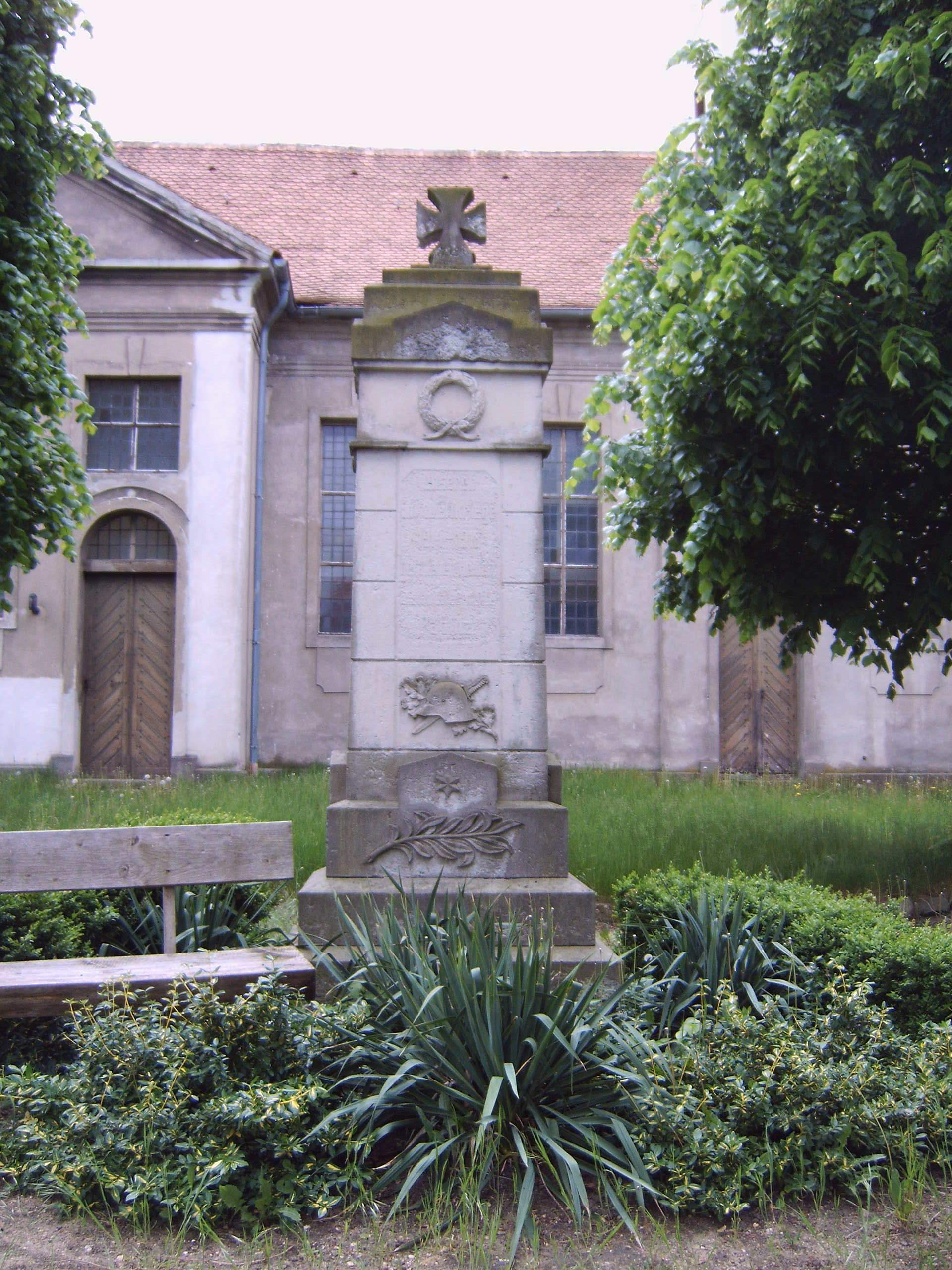 Kriegerdenkmal in Paplitz, vor der Dorfkirche Bild aufgenommen am 22.5.2006 durch Olaf Meister